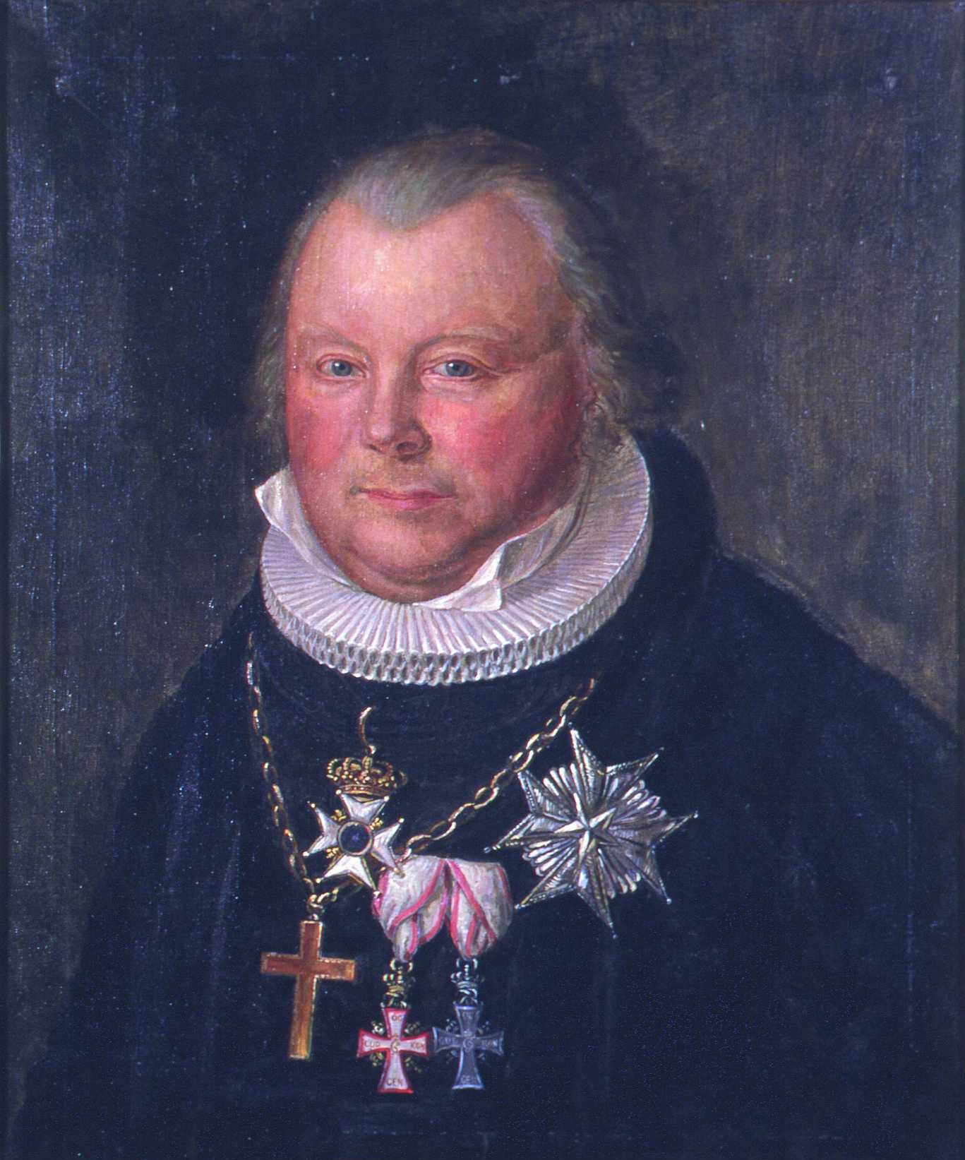 Portrett av biskop Frederik Julius Bech. Grått hår. Kledd i prestekappe og -krave. Kors og ordener. Fra Selskapet til Eidsvoldsbygningens Udstyr. Selskapet ble opprettet 1895 og nedlagt i 1918, og samlet inn gjenstander og inventar til Eidsvollsbygningen til grunnlovsjubileet i 1914. Biskop Bech deltok på notabelmøtet 16.feb 1814.